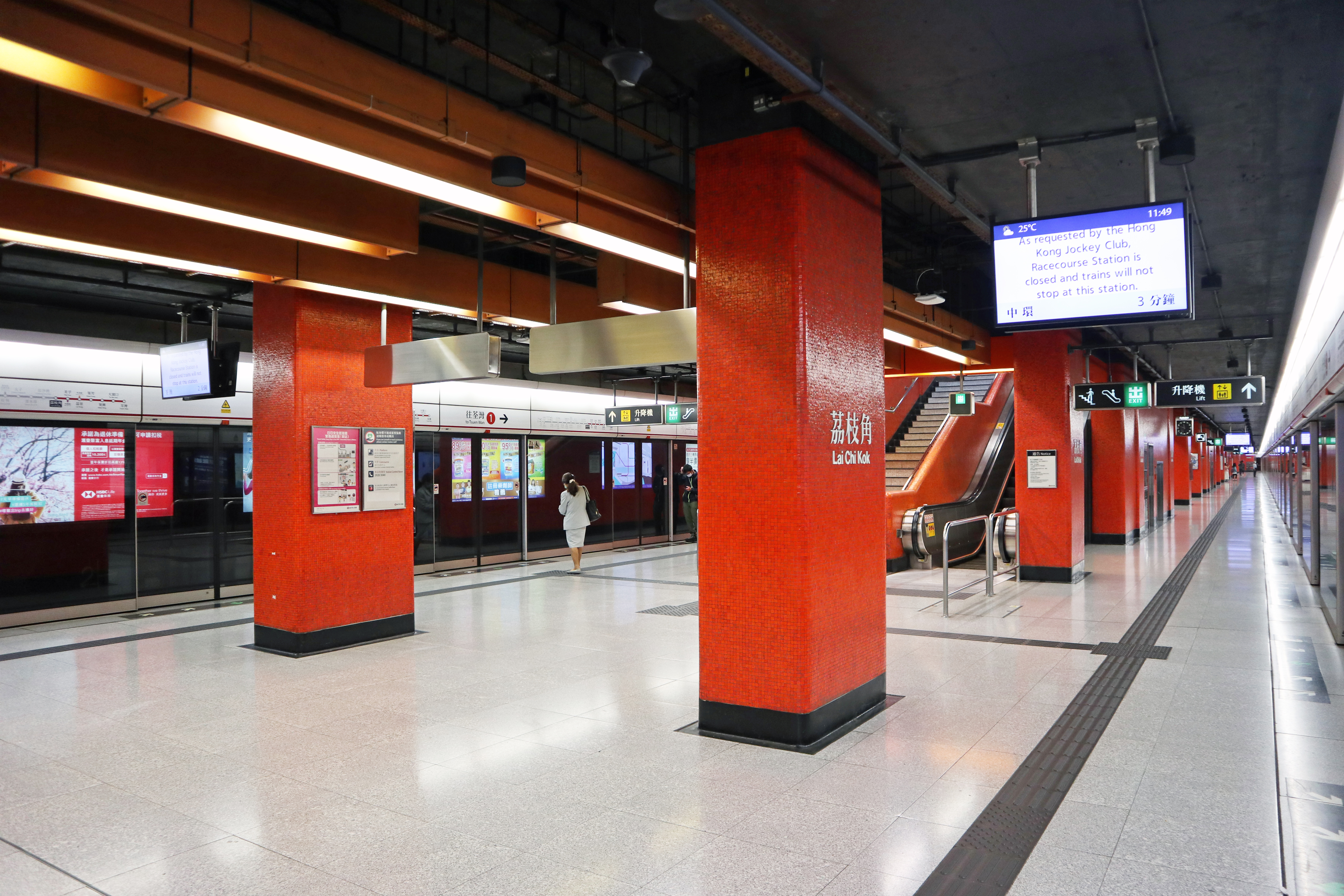 港鐵荔枝角站月台